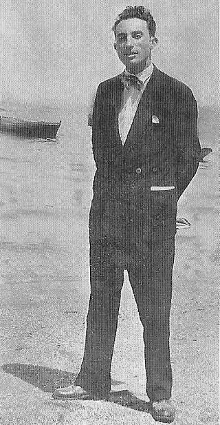 Johán Carballeira